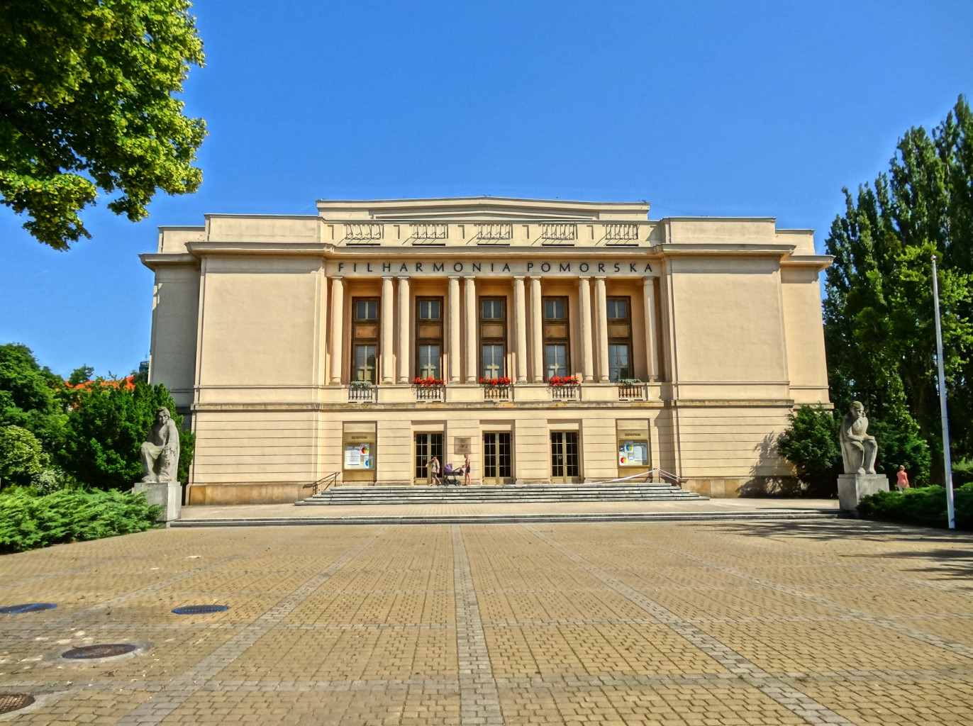 Budynek Filharmonii Pomorskiej im.Ignacego Jana Paderewskiego w Bydgoszczy zbud.w 1955 r.